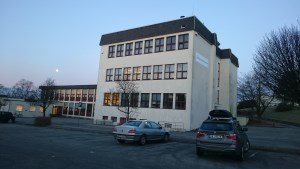 Foto av bygning